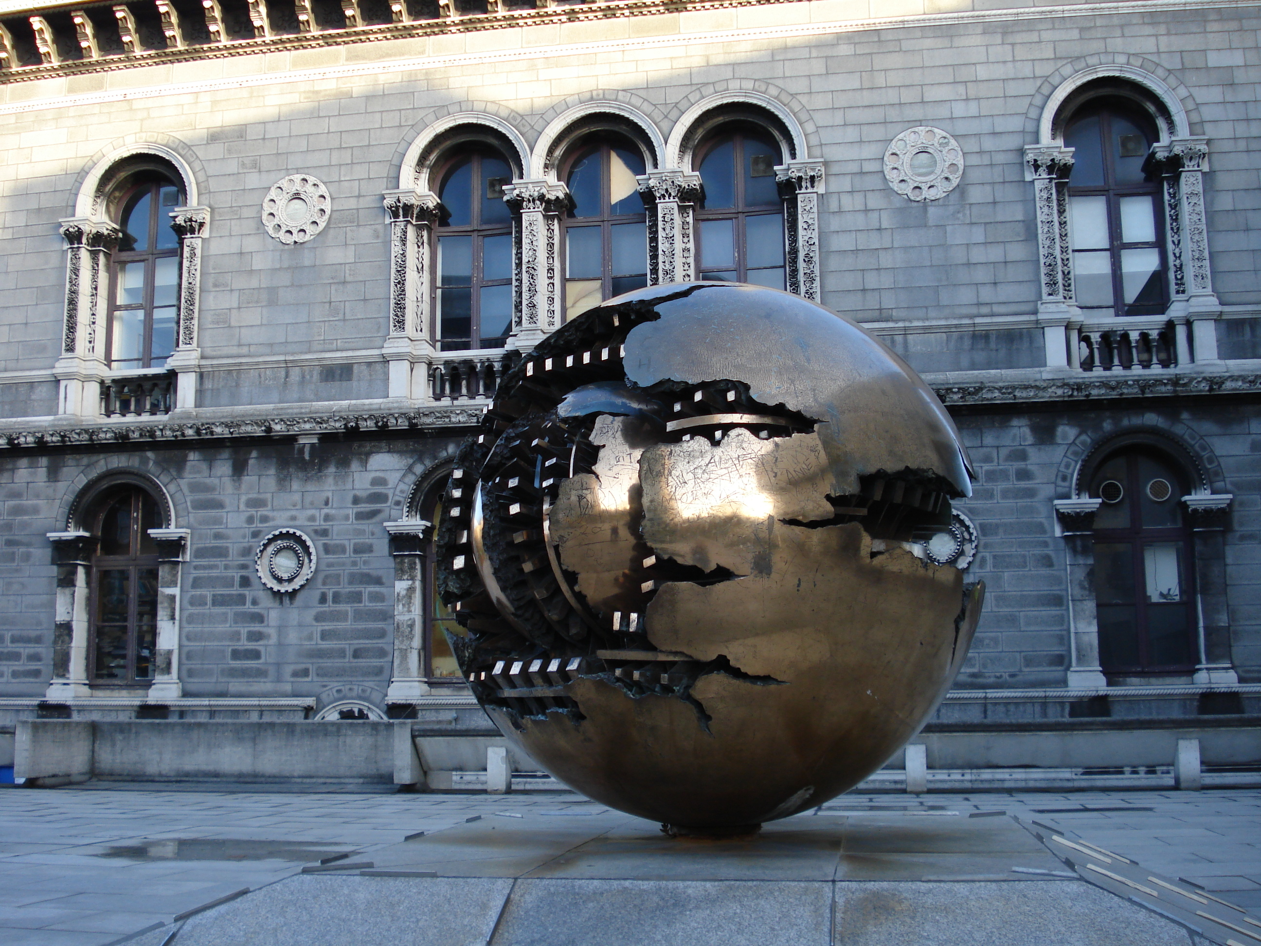 Trinity College Kunstwerk Dublin Ireland